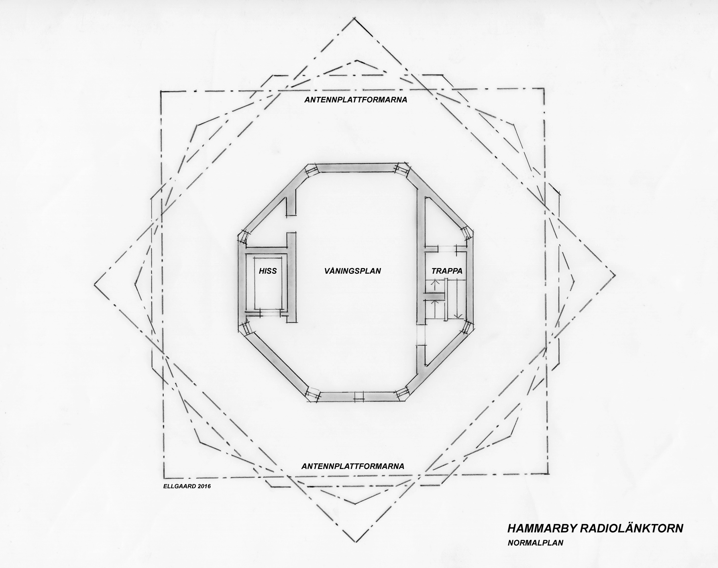 Hammarby radiolänktorn, planritning, källa Arkitektur 1988, häfte 6